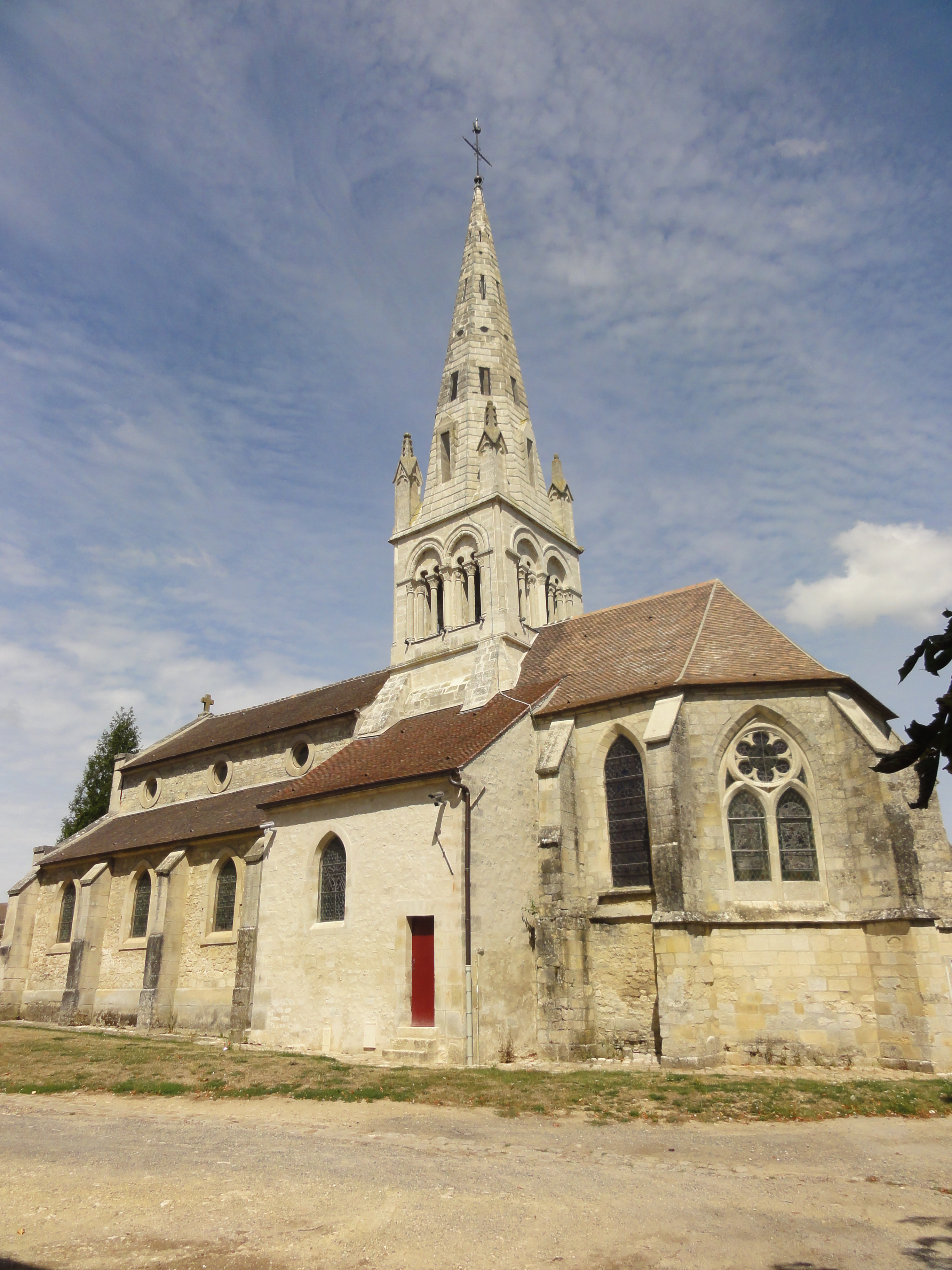 Église Saint-Martin de Néry (voir titre).